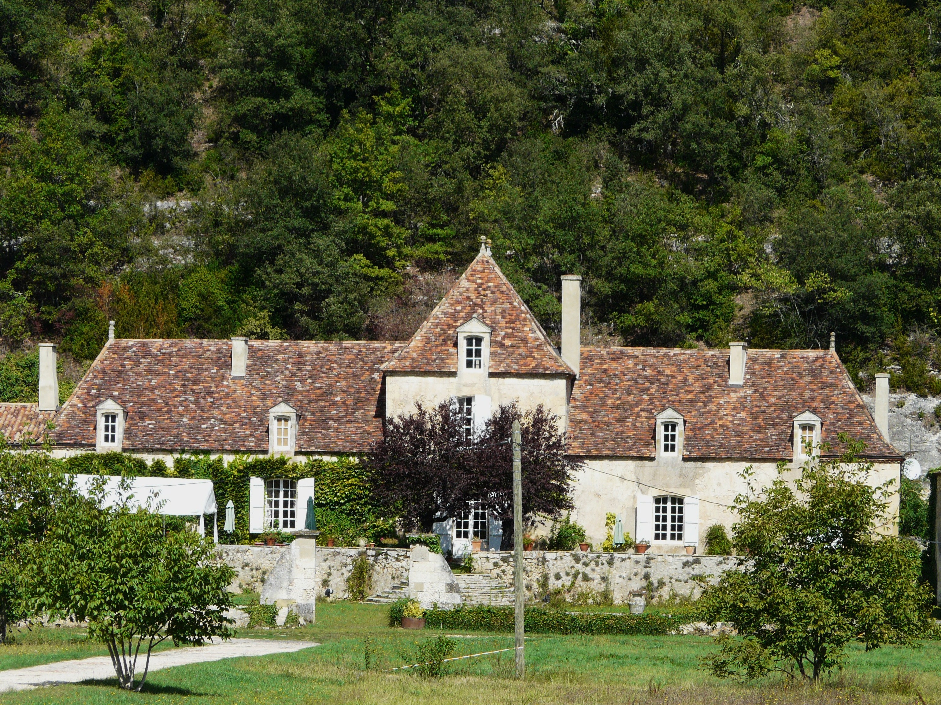 Le logis principal de la chartreuse de la Borie-Basse, Baneuil, Dordogne, France.